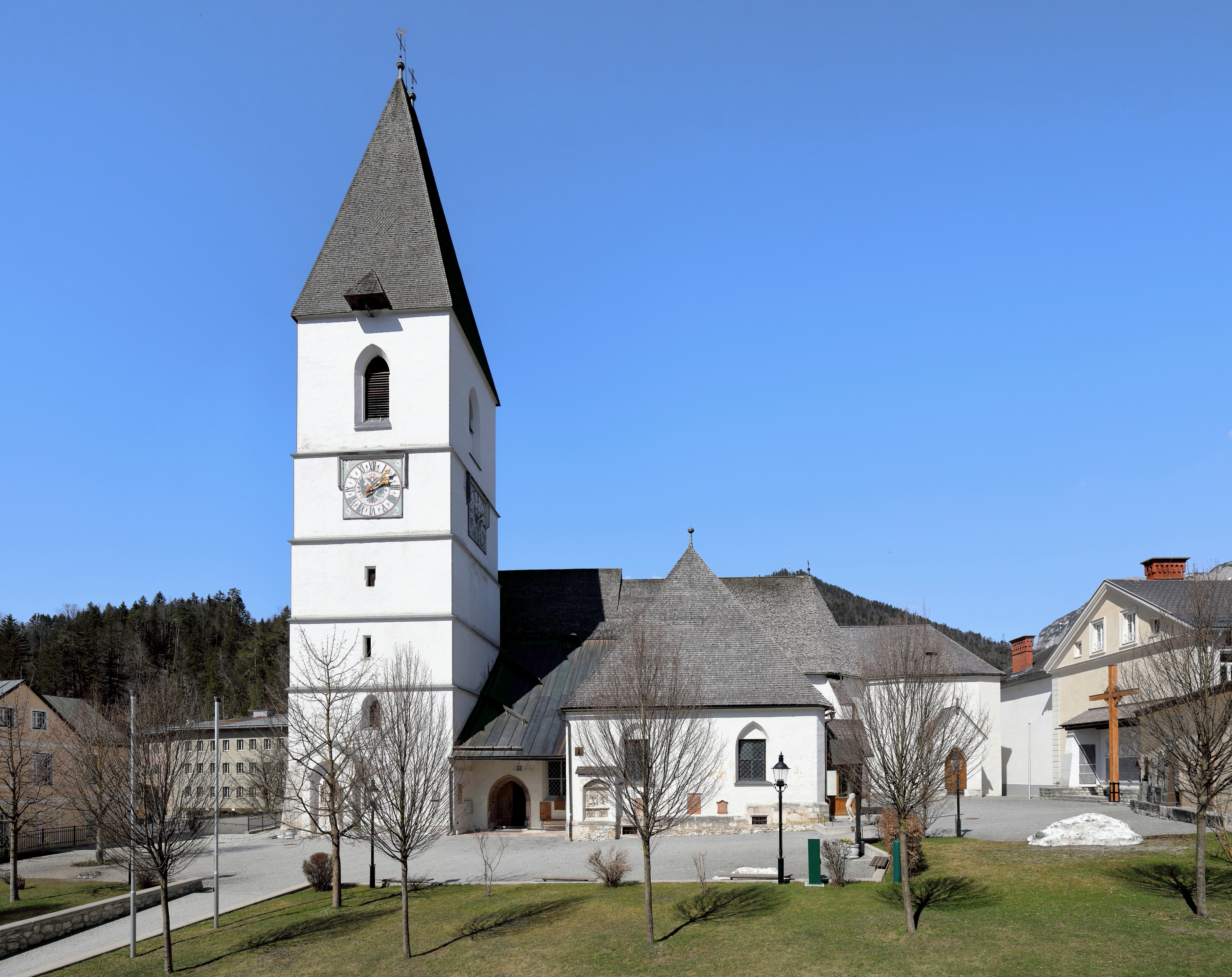 Südansicht der röm.-kath. Pfarrkirche St. Paul in der steirischen Stadtgemeinde Bad Aussee.Ursprünglich eine romanische Kirche mit einem Chorturm. Im 15. Jahrhundert wurde sie umgebaut und erweitert.